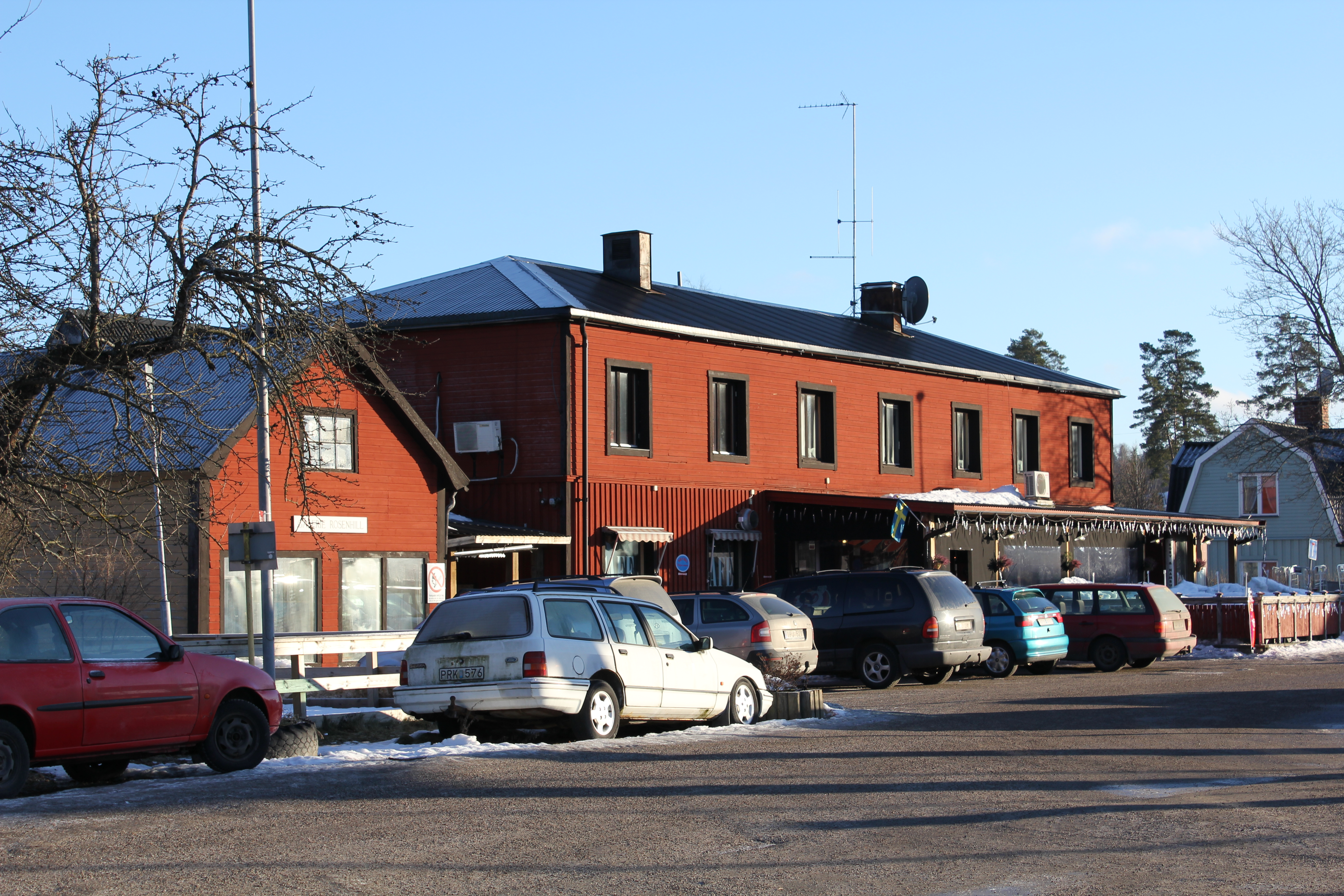 Rosenhills café och galleri, Rosenhill, Grödinge, Botkyrka.